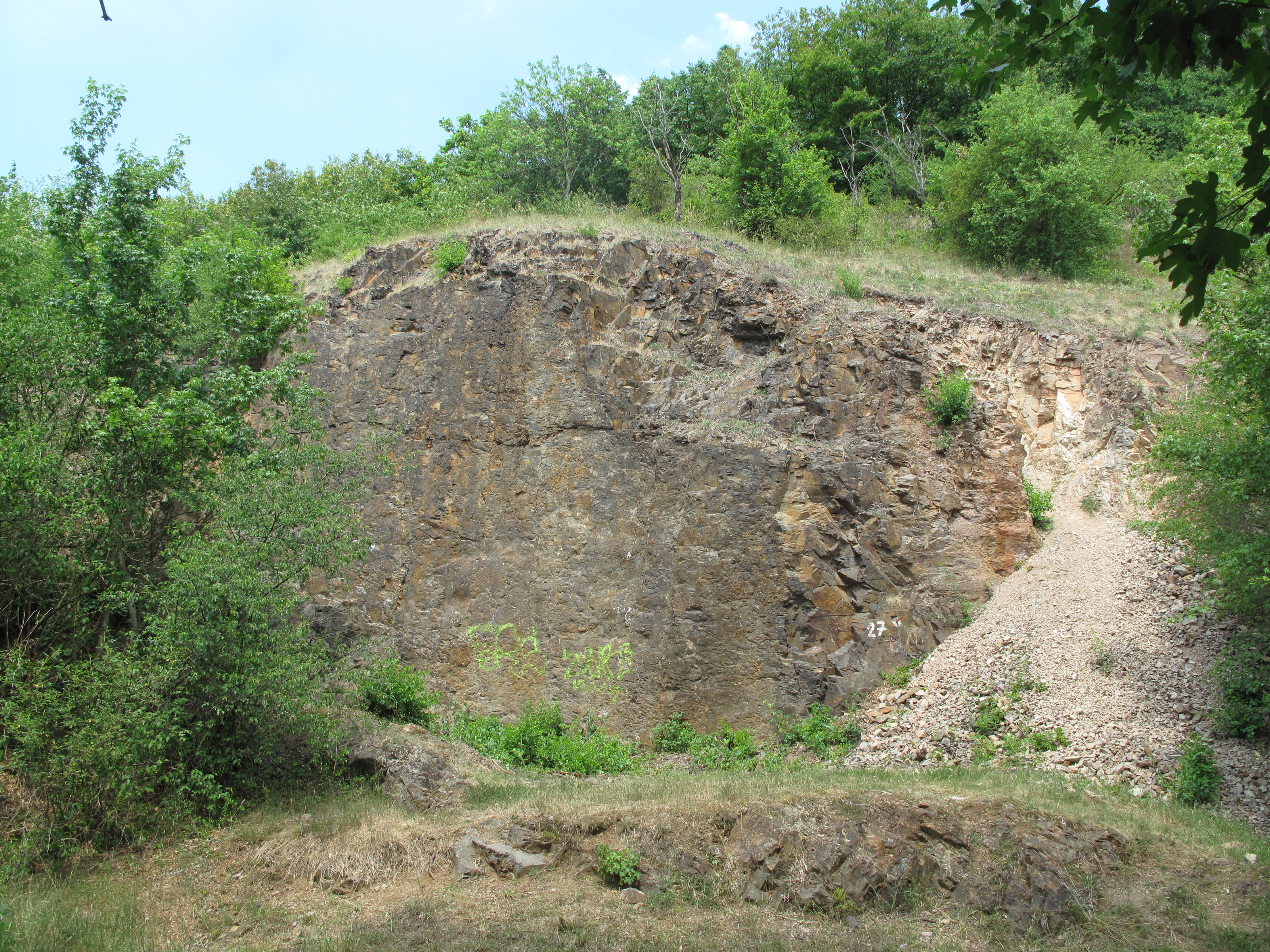 Cesta podél Únětického potoka mezi obcemi Únětice a Roztoky